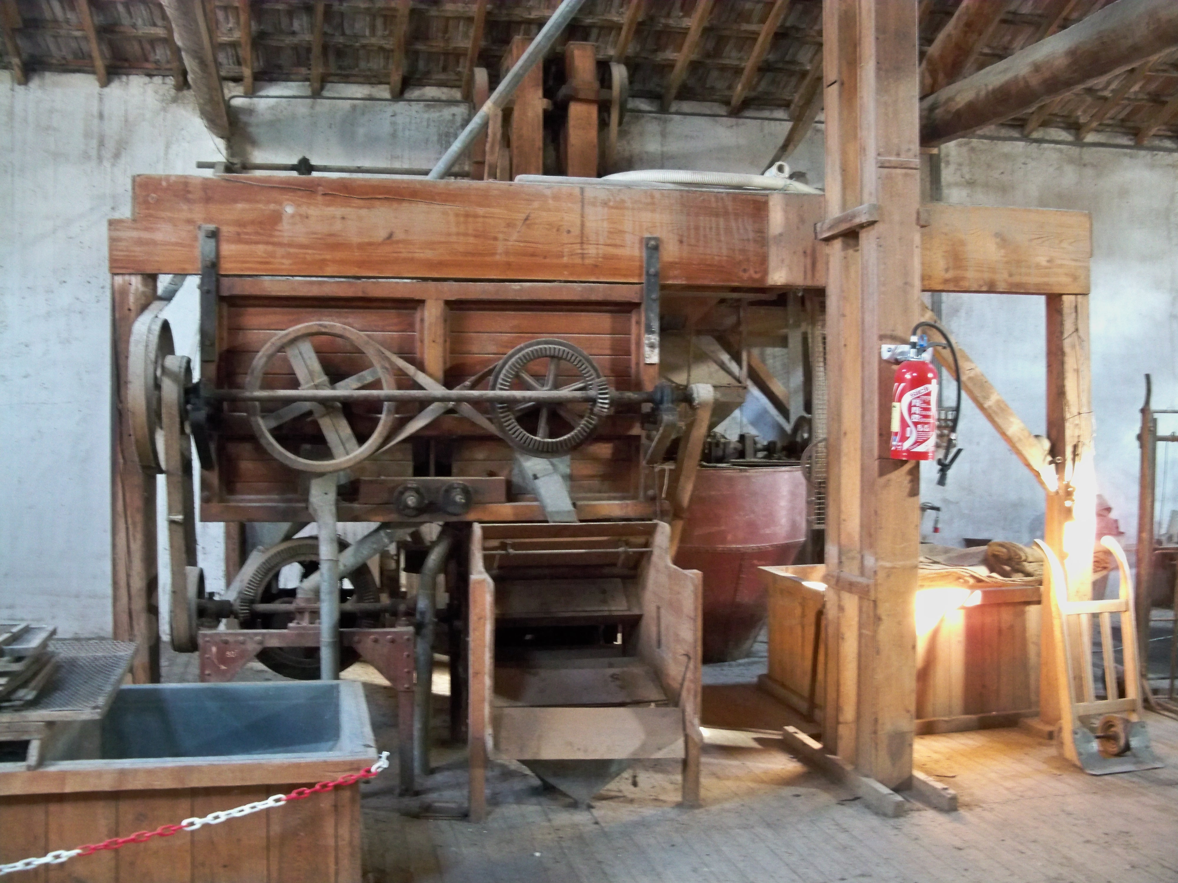 Intérieur de la Graineterie Aimé Roux, Carpentras (84) .